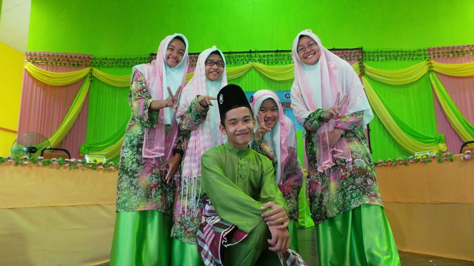 pesta pantun 1